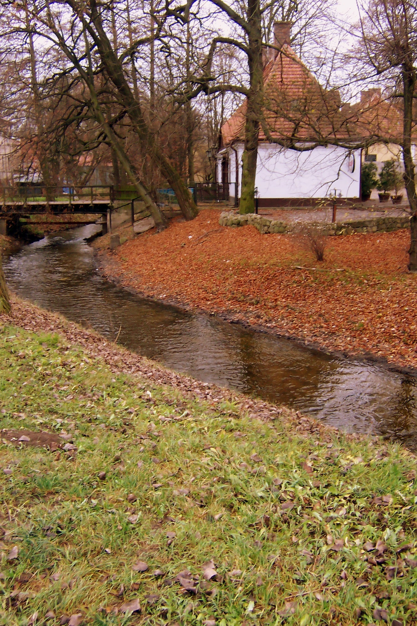 Paklica przed zamkiem w Międzyrzeczu, blisko ujścia do Obry